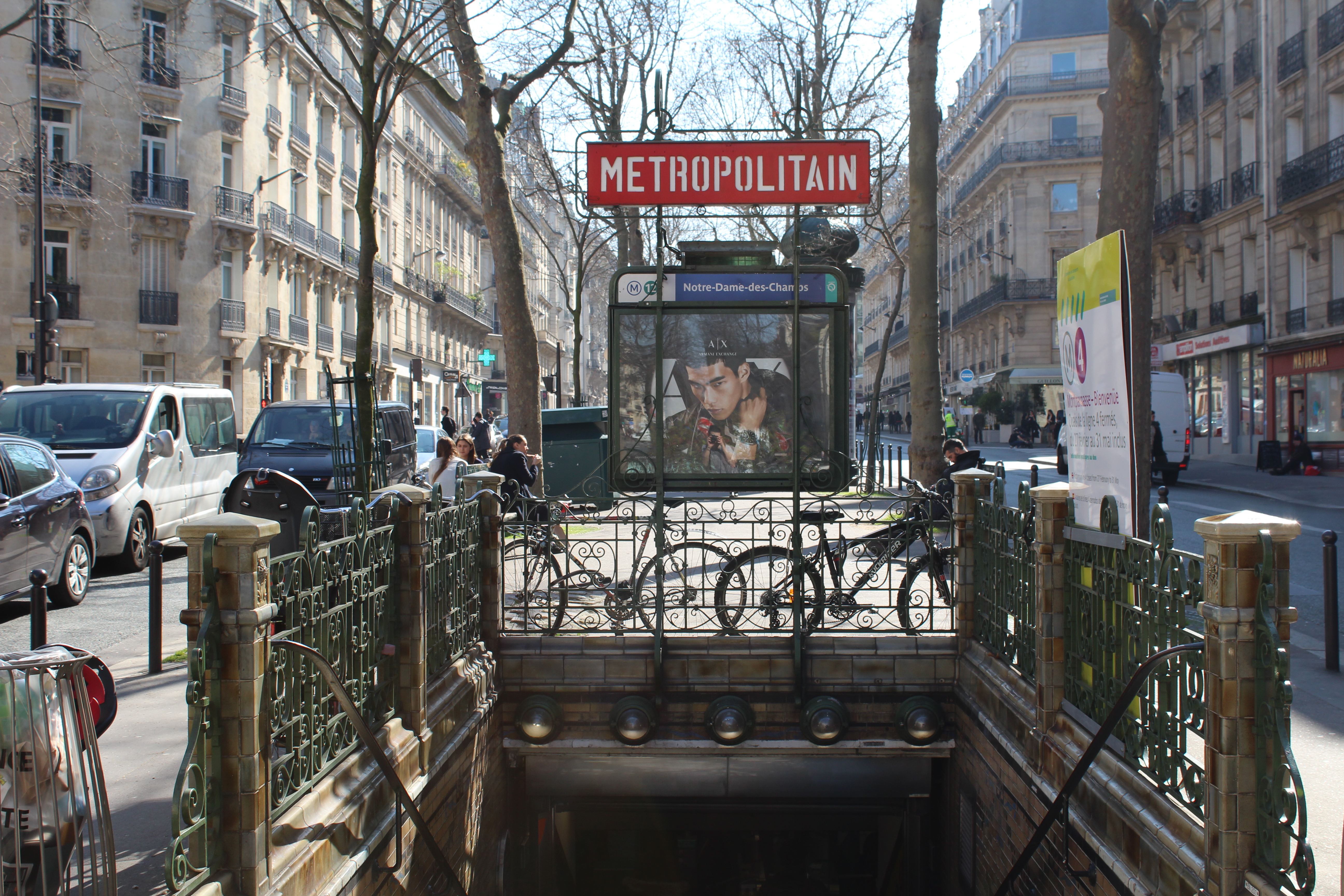 Entrée de la station de métro Notre-Dame-des-Champs à Paris.